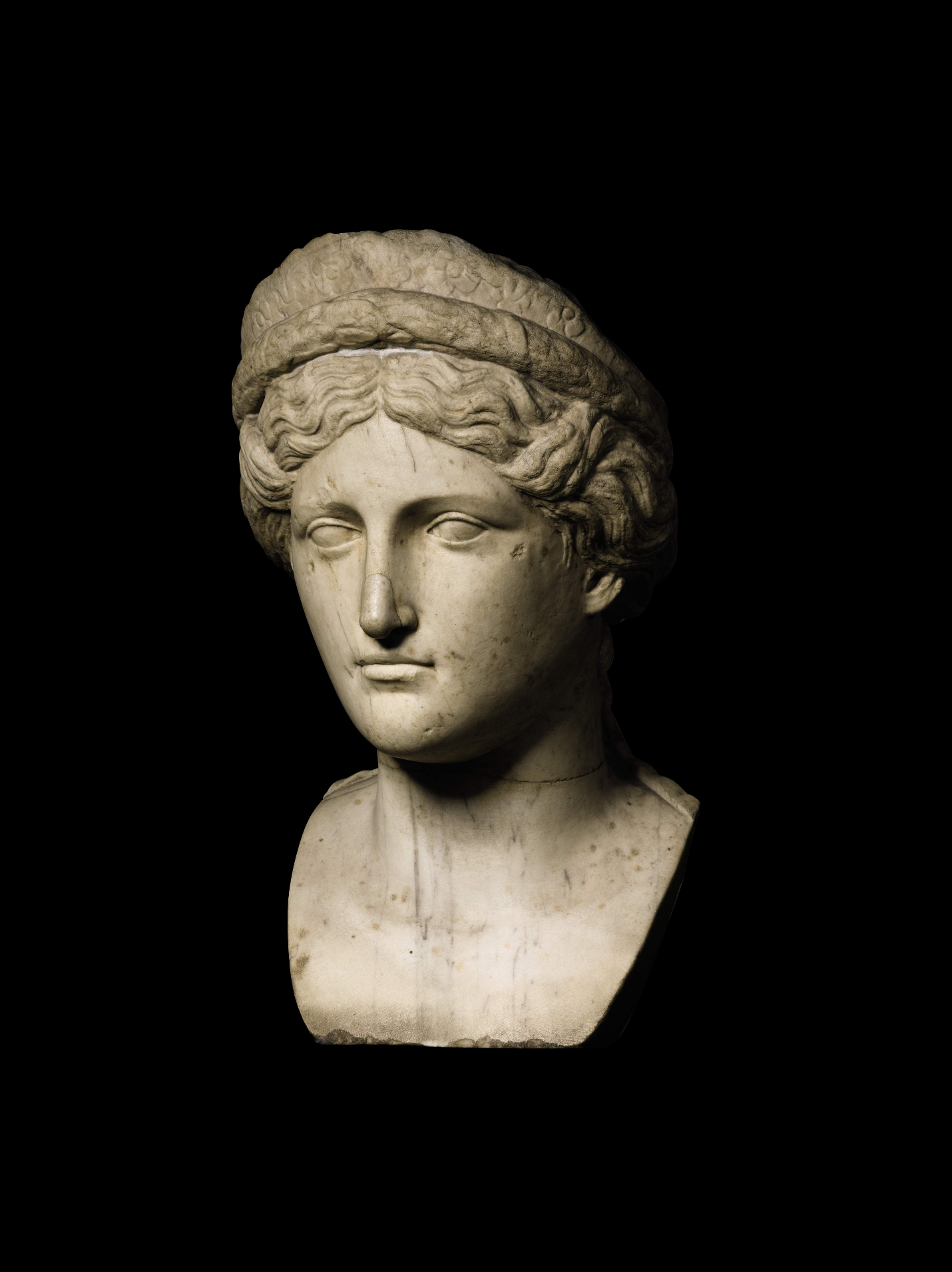 Ritratto di Antonia Minore. Seconda metà I secolo d.C.